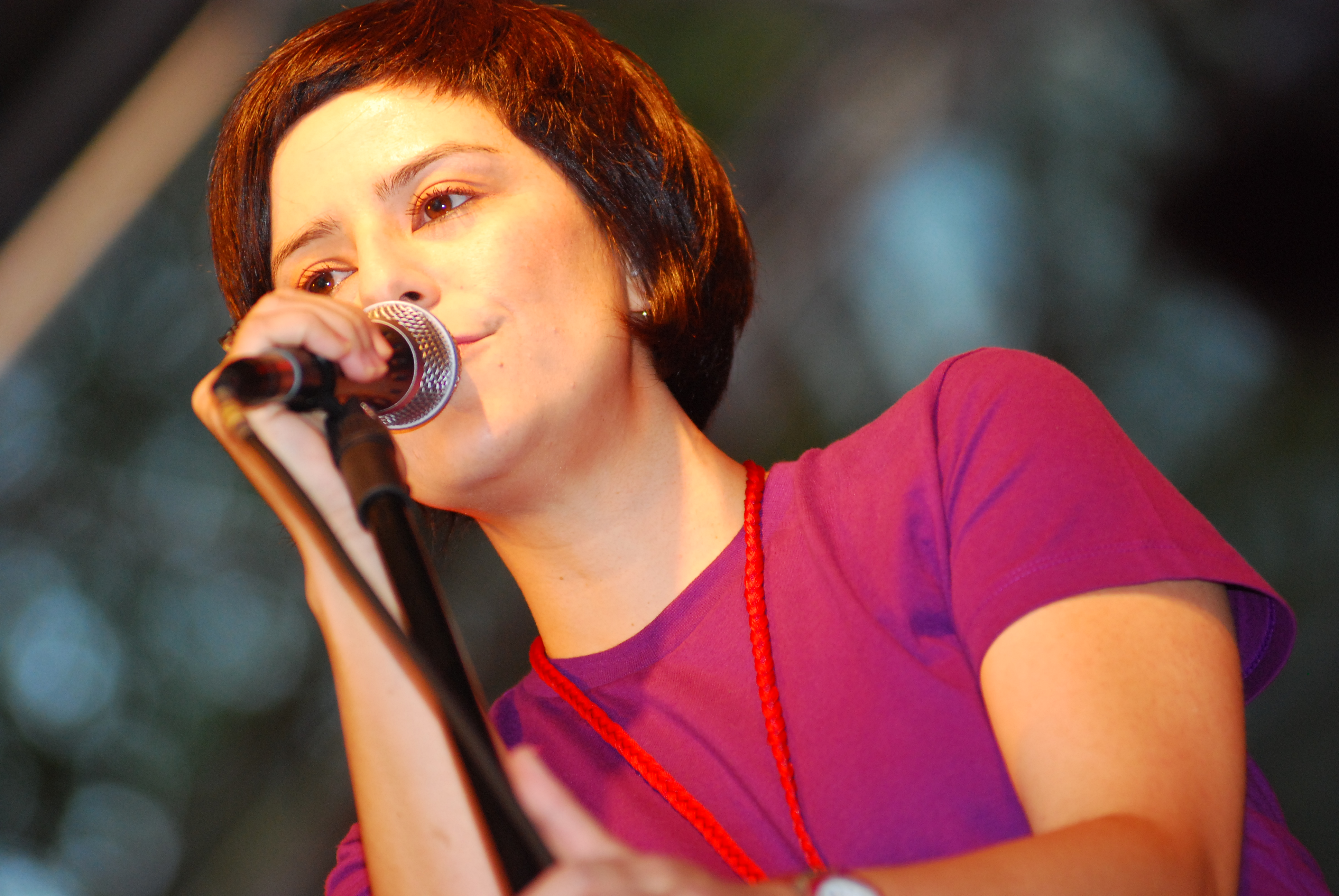 Fernanda Takai, brazilian singer. Foto: Silvio Tanaka.